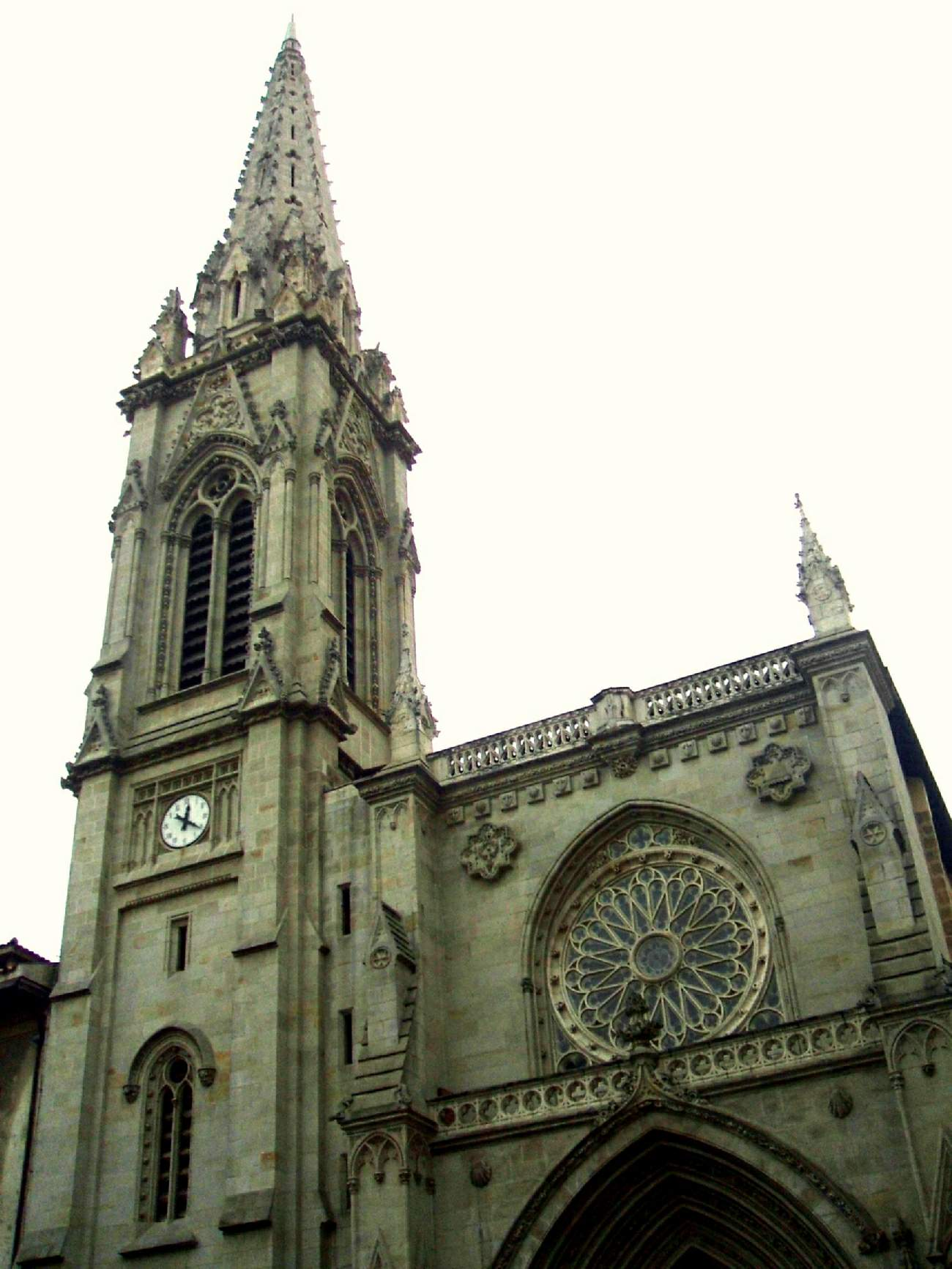 Bilboko Santiagoko Katedralaren fatxada neogotikoa, Euskal Herria